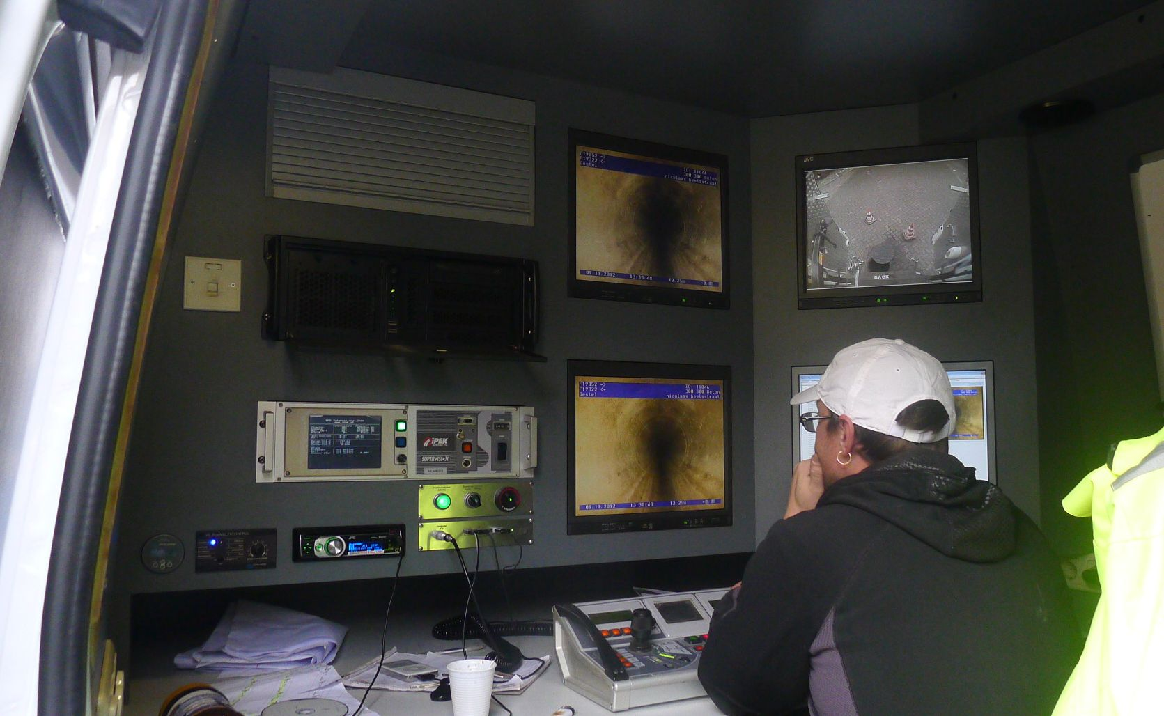 Mobiel kantoor van een rioolvideoschouwbedrijf.